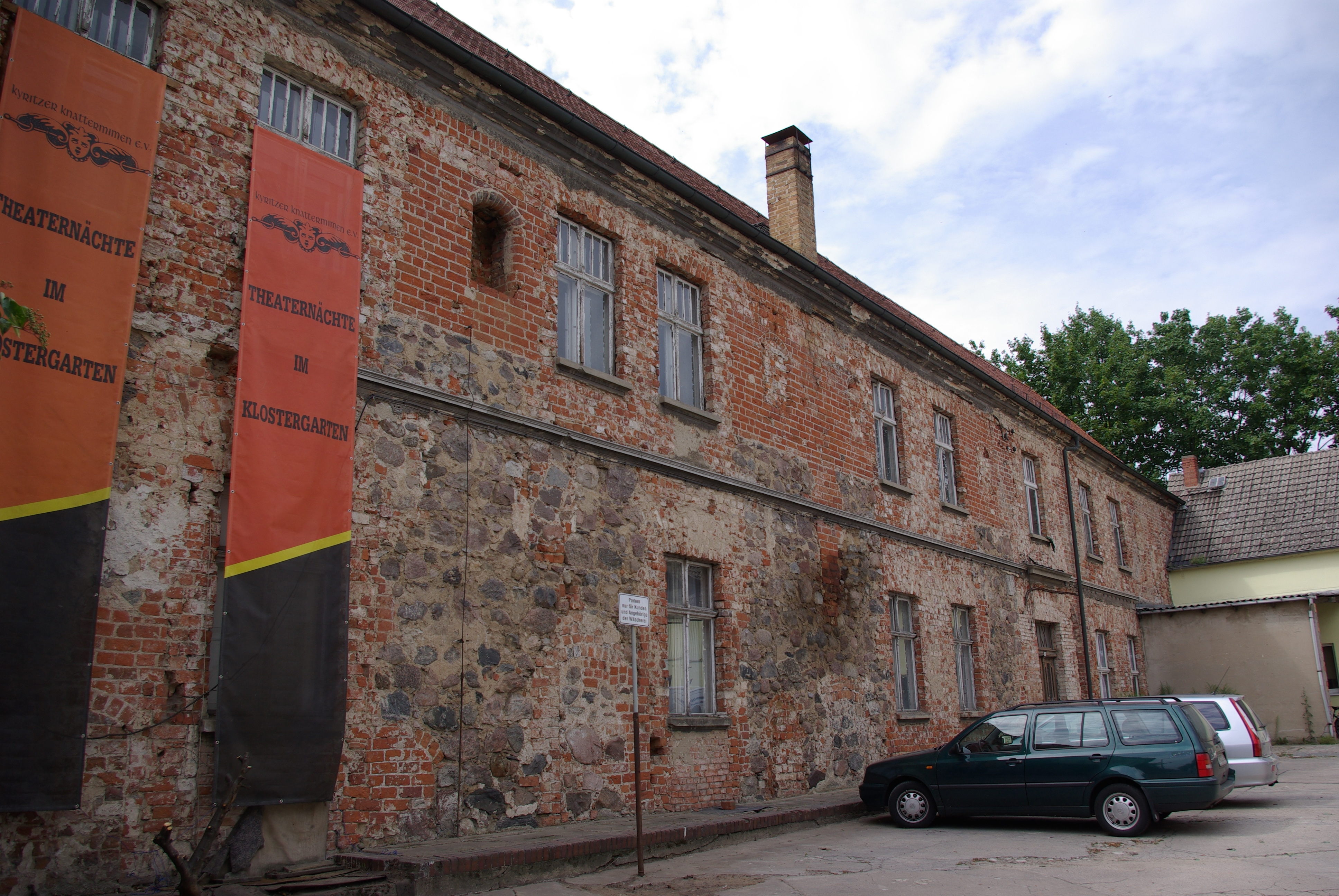 Kyritz in Brandenburg. Die Klostermauer befindet sich in der Johann-Sebastian-Bach-Straße 2 und steht unter Denkmalschutz.